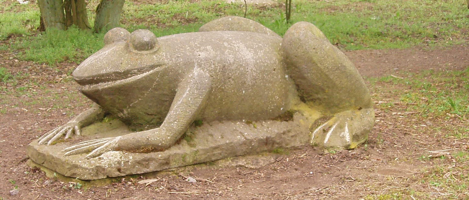 Nachbildung eines Riesenfroschs im Geogarten beim Bahnhof Engeln